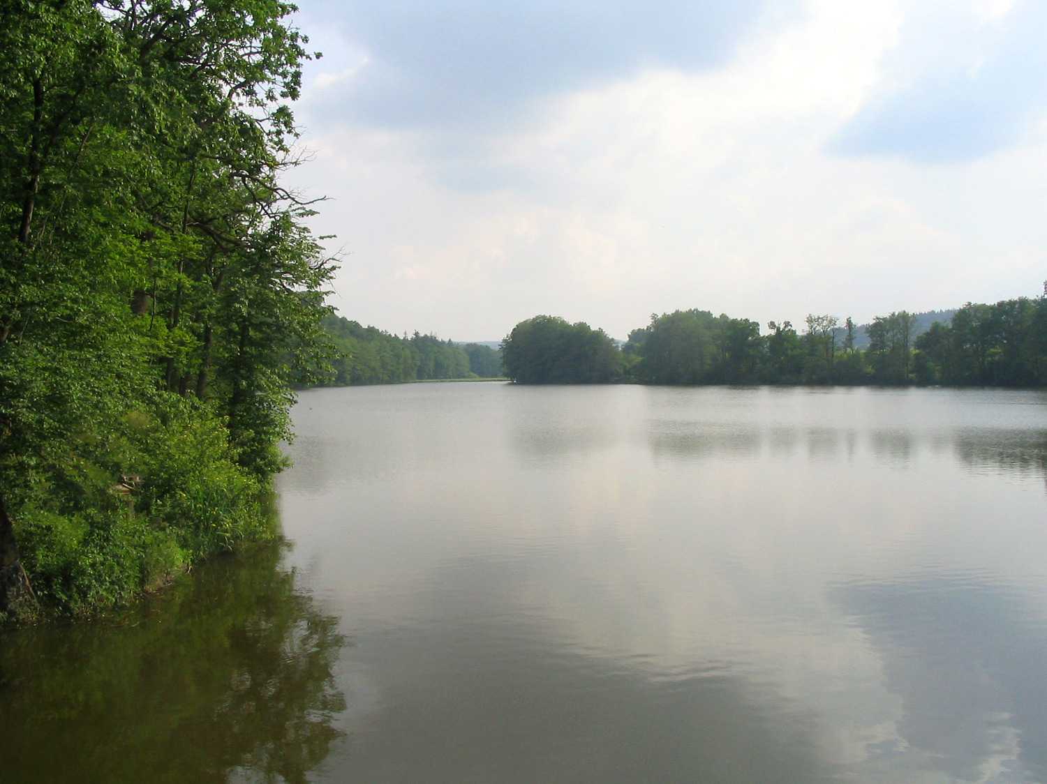 Rybník Kacerna od výpusti (Okres Plzeň-jih).